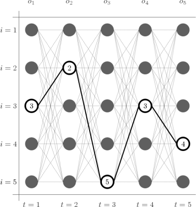 Viterbi algorithm - Hidden Markov Model